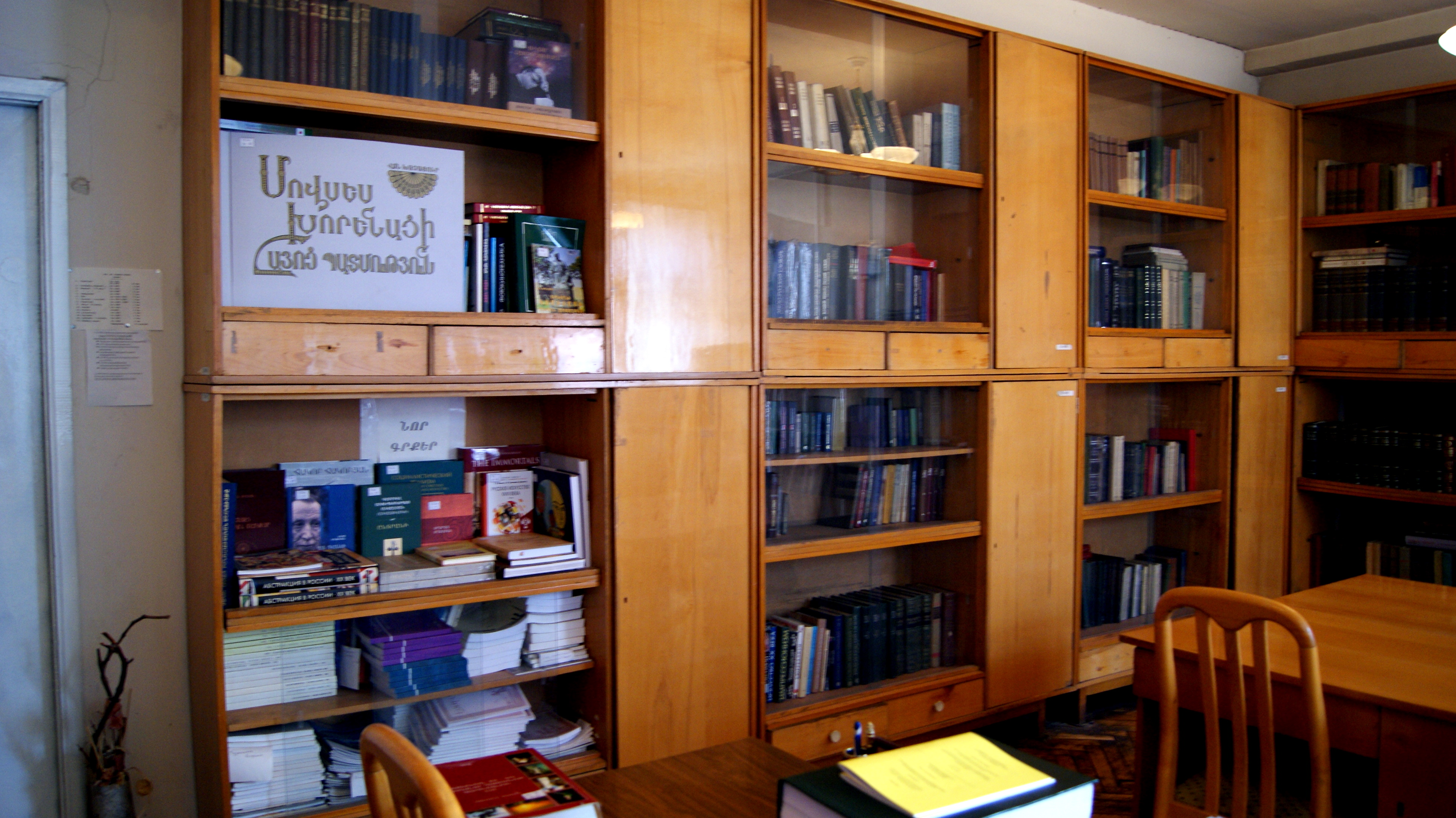 Library of Institute of Arts of NAS, RA